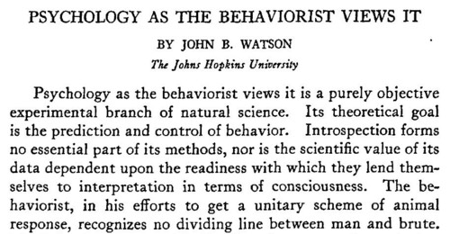 Psychology as the behaviorist views it (1913): aanvang van het originele artikel door John Broadus Watson